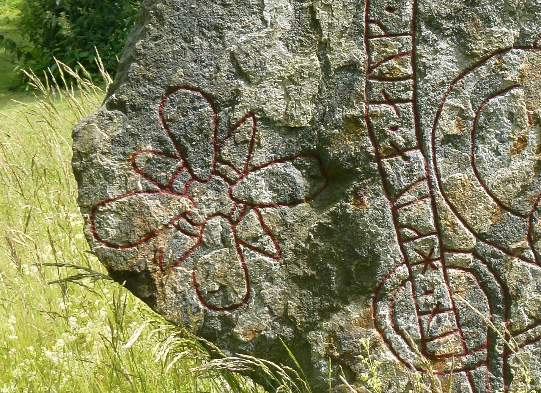 U 604, runsten vid Almare-Stäkets herrgård, korset